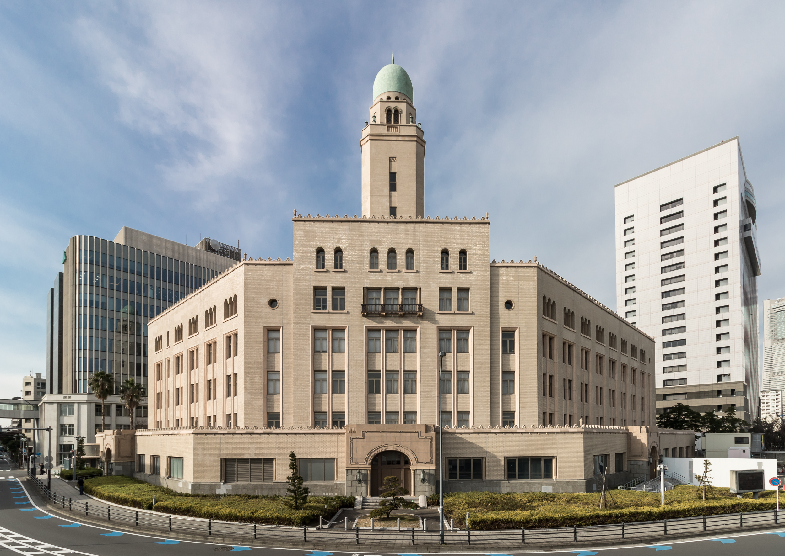 横浜税関（神奈川県横浜市）